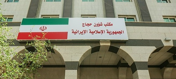 ساختمان بعثه مقام معظم رهبری در مدینه منوره